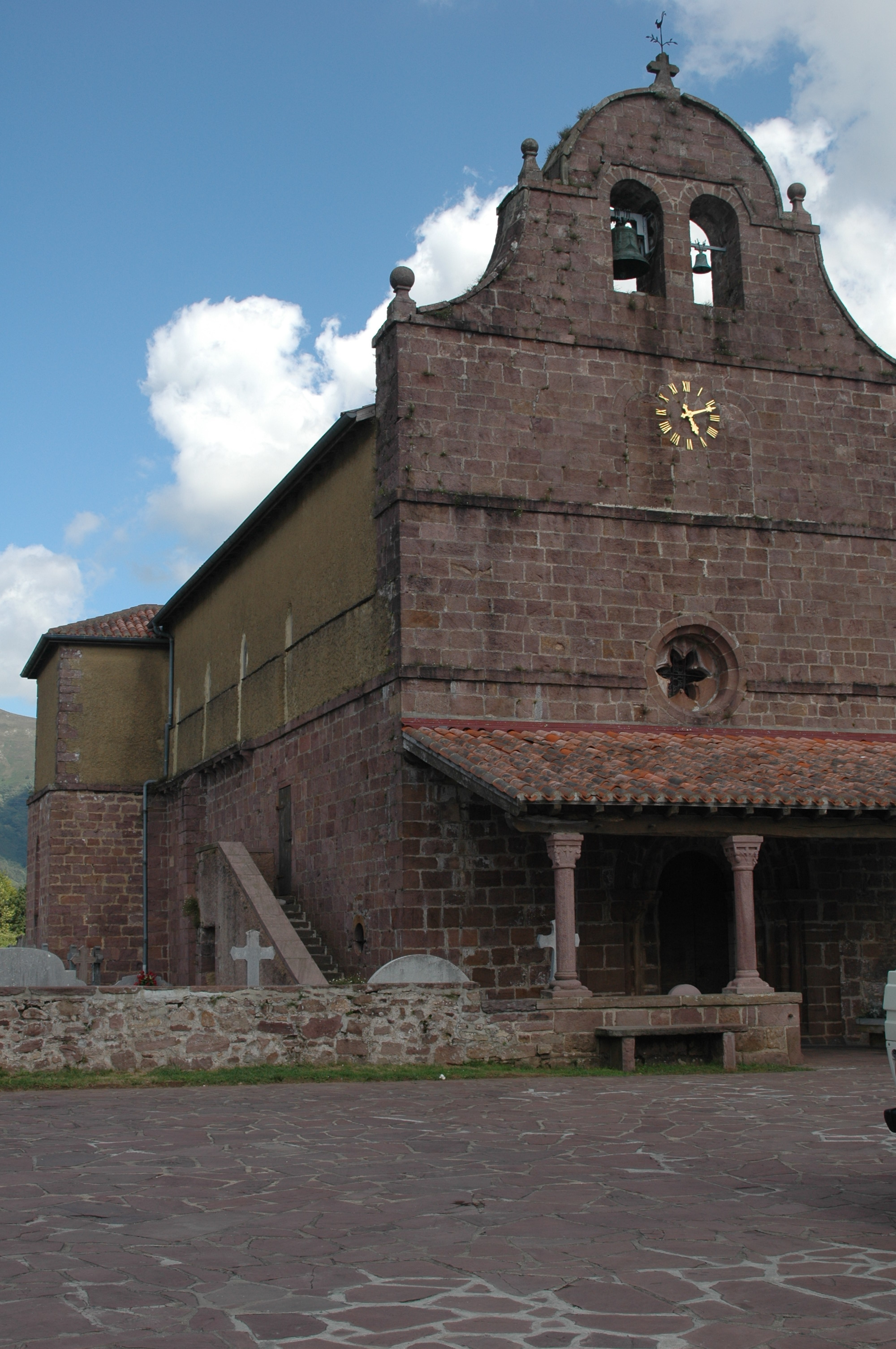 Bidarray, l'église. Photo prise le 03/08/06 par Harrieta171